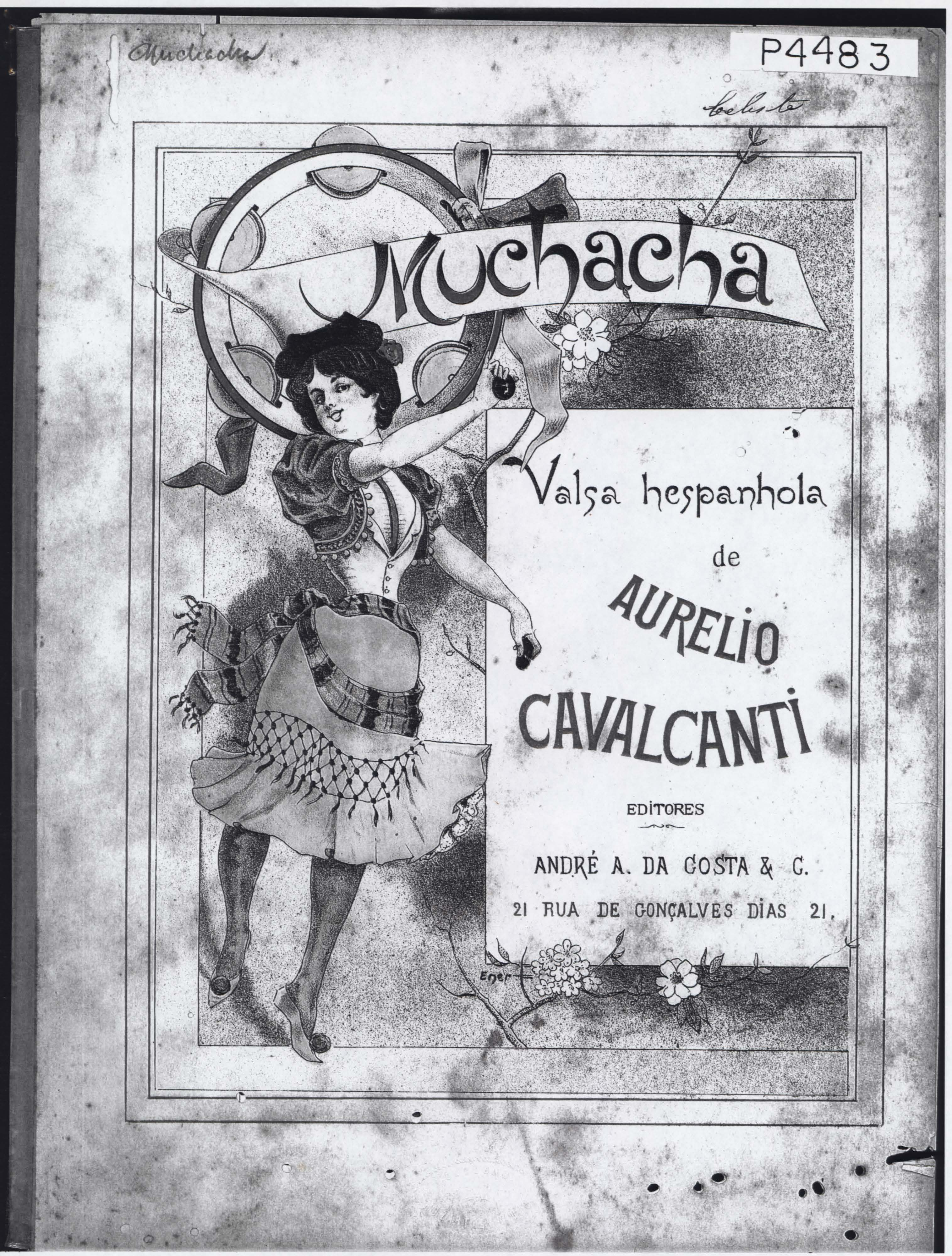 Capa da partitura da valsa Muchacha, de autoria de Aurélio Cavalcanti, publicada por André A. da Costa & C.